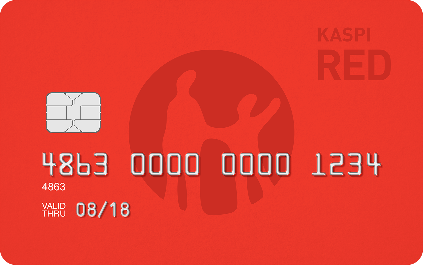 Шаблон карты участника клуба Kaspi Red